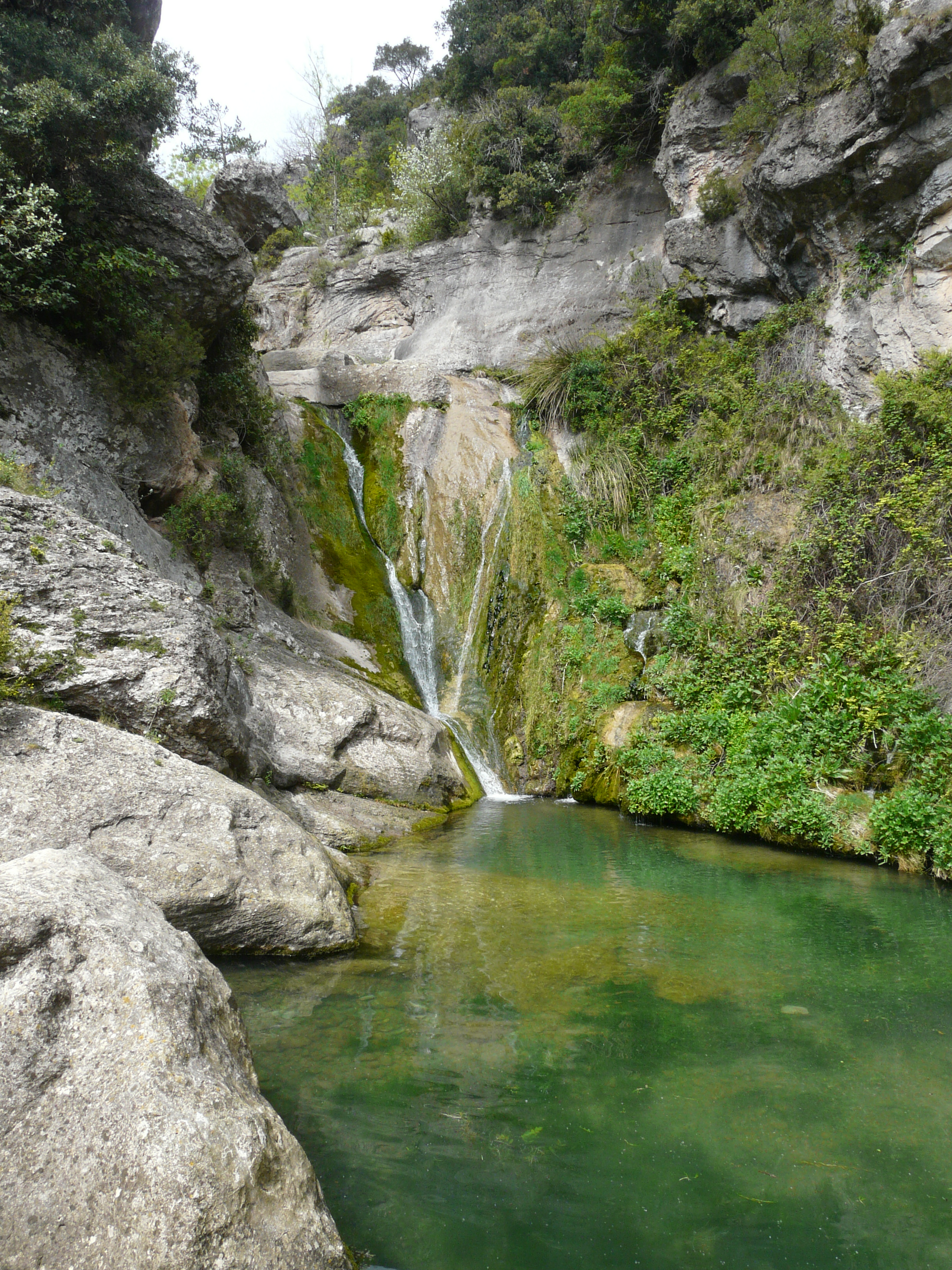 Fotografia presa entre Mont-ral i les fonts del riu Glorieta. Muntanyes de Prades (Baix Camp, Conca de Barberà, Alt Camp, Priorat, Garrigues) (Montblanc, Vimbodí, Mont-ral i altres). This is a a photo of a natural area in Catalonia, Spain, with id: ES510143